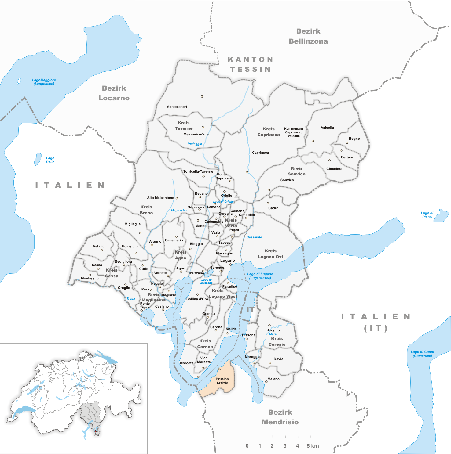 Municipality Brusino Arsizio